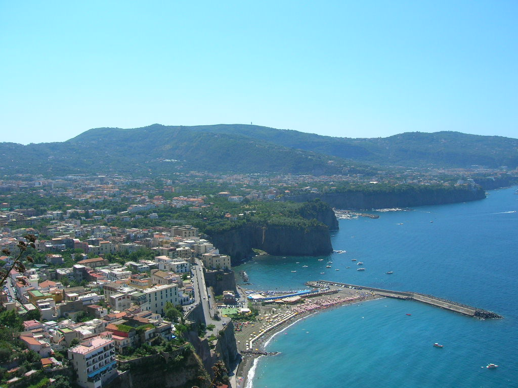 In primo piano Meta. In fondo il resto della Penisola Sorrentina.